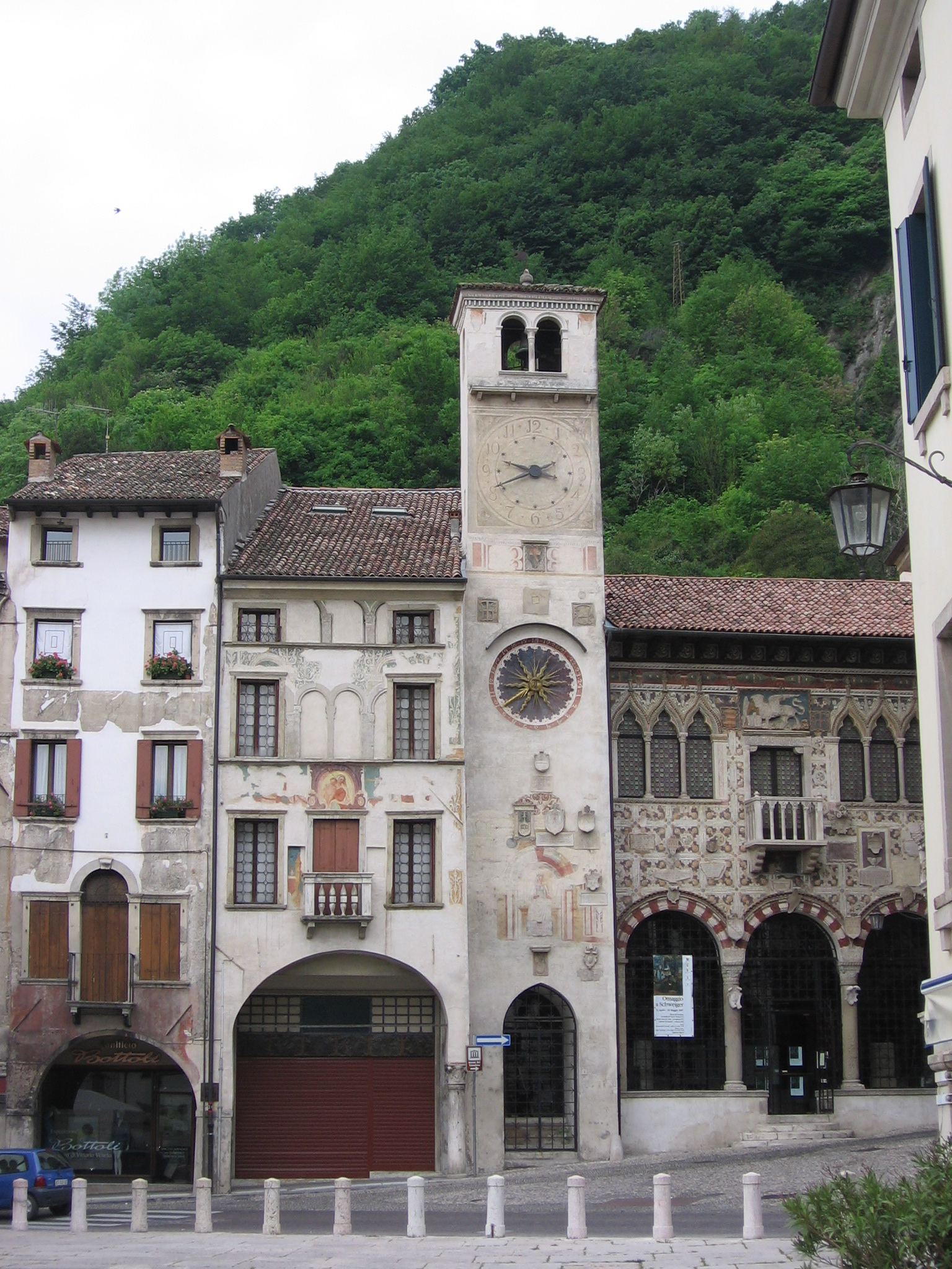 Torre dell'orologio di Serravalle (Vittorio Veneto, Treviso)